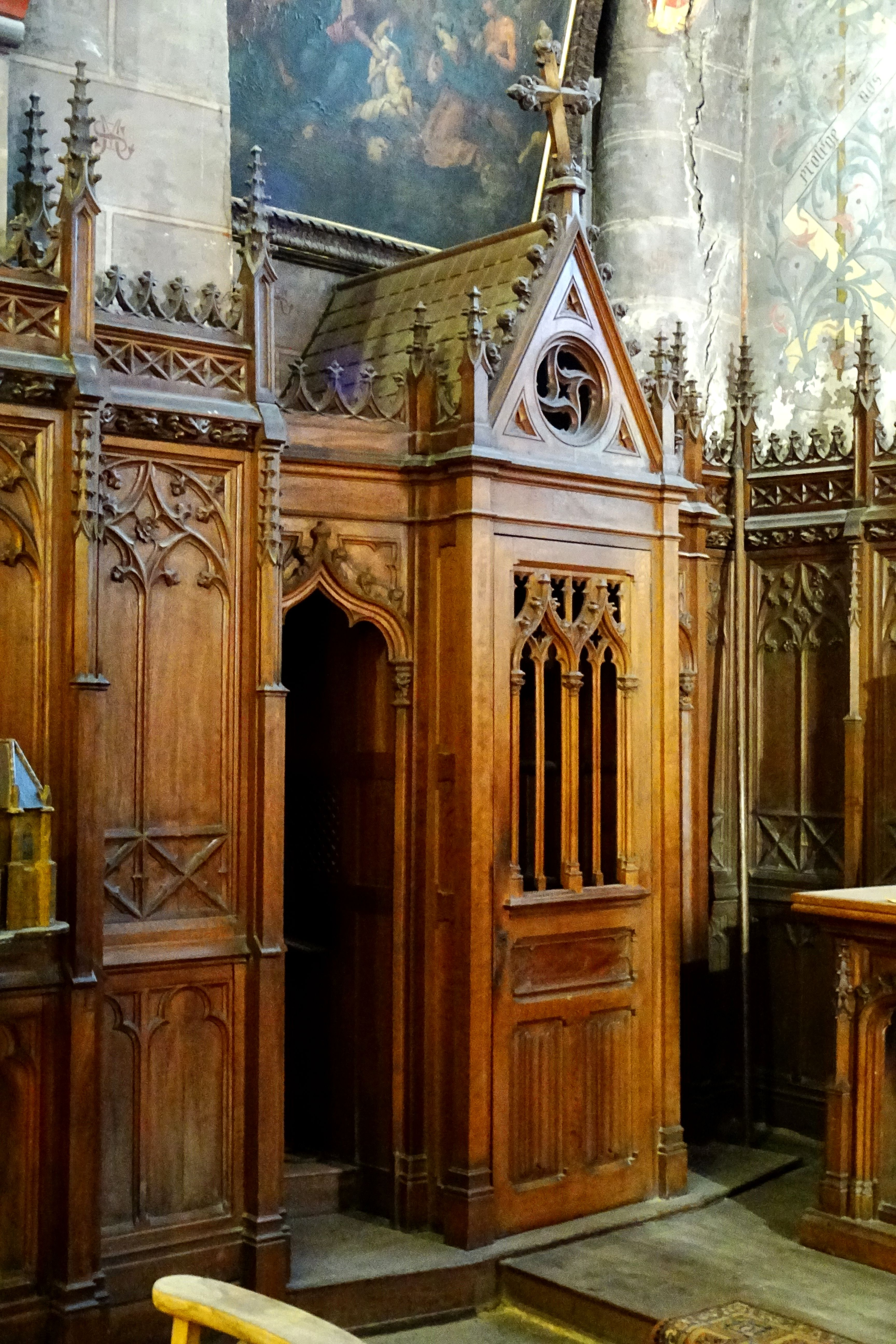 Chapelle latérale nord (chapelle Sainte-Honorine), 2e travée, confessionnal, par L. André et Moisseron, Angers, 1891.